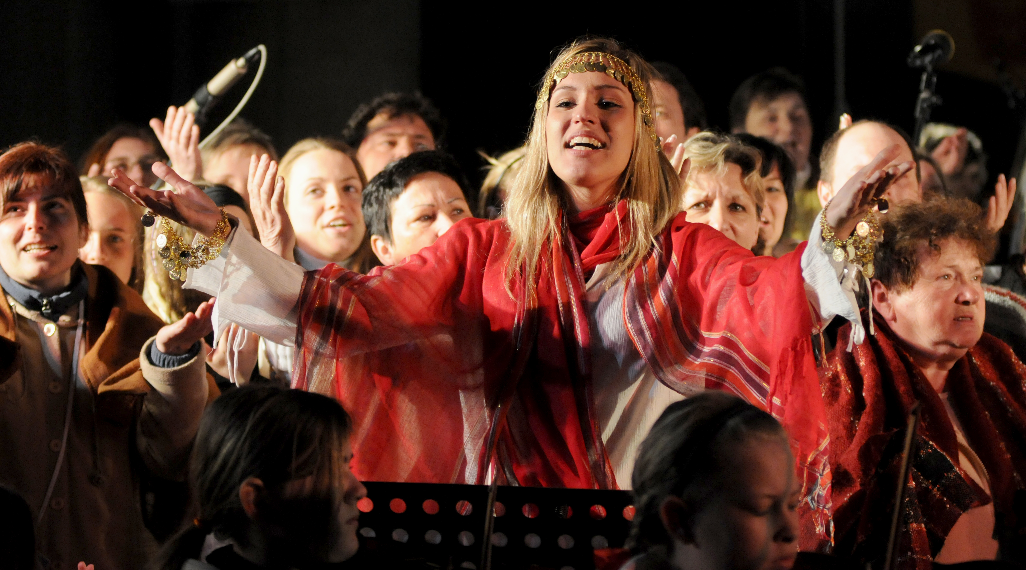 Simona Mrázová jako Máří Magdaléna a sbor v oratoriu Pavla Helebranda Evangelium podle houslí